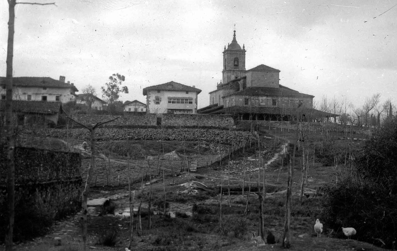 Lezama herriaren ikuspegia XX. mendearen hasieran